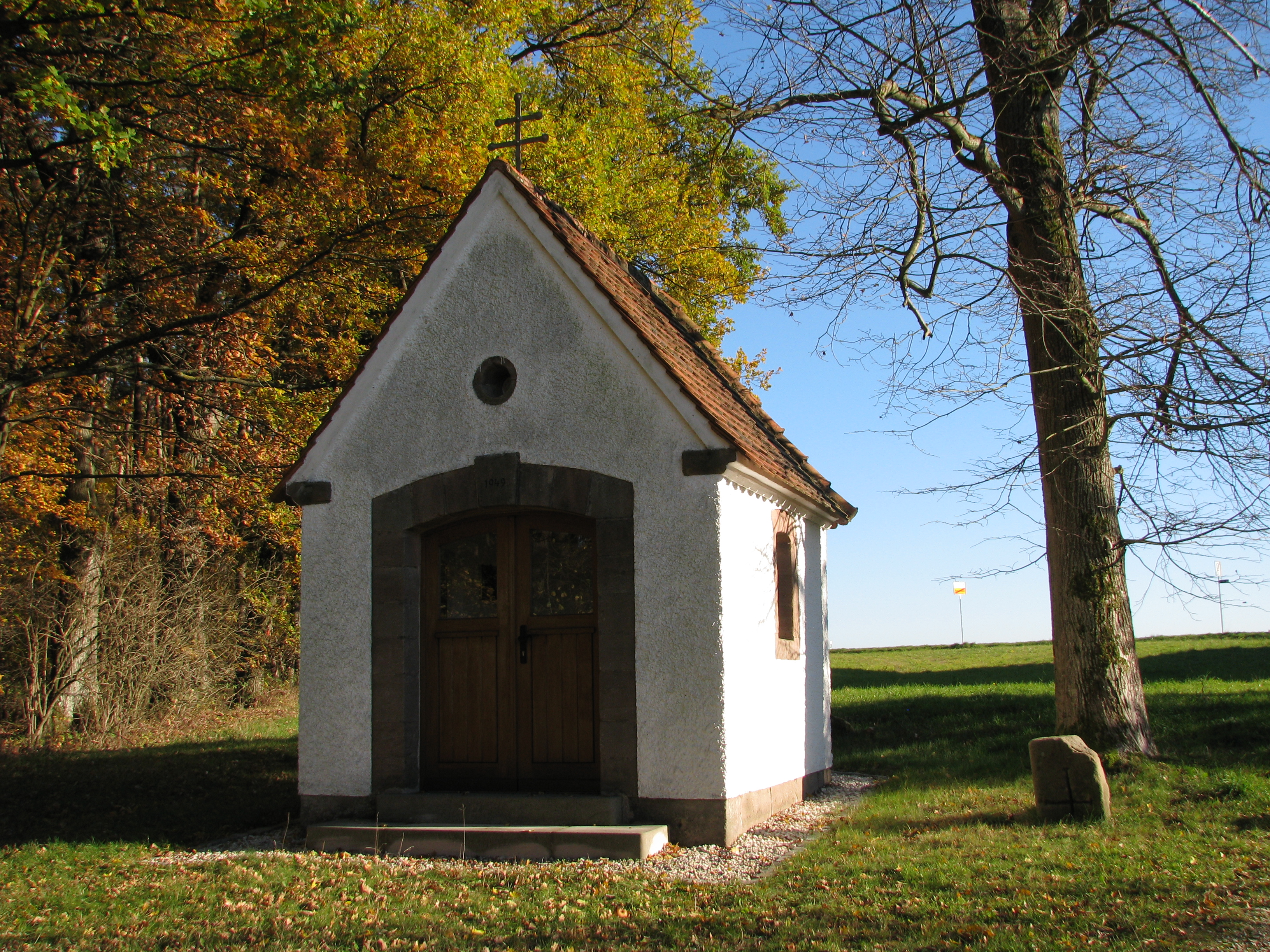 Marquardsholz, Ortsteil von Hilpoltstein im mittelfränkischen Landkreis Roth, Götzkapelle